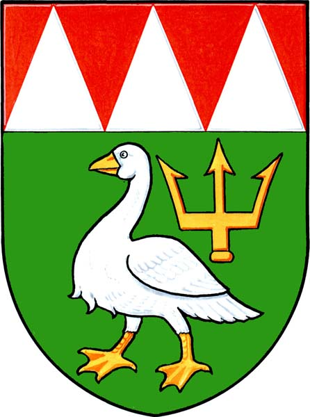 Česky: znak obce Lutín